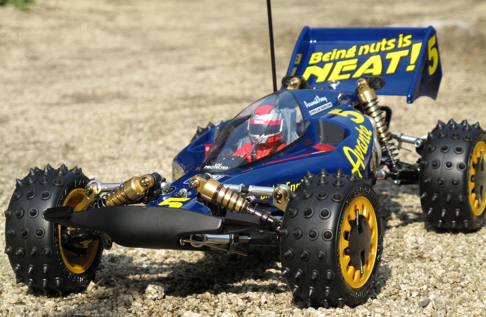 1988年以来、23年ぶりに復活した田宮模型のラジコン、『アバンテ2011』